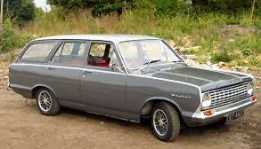 1965 Vauxhall Victor FC 101 estate